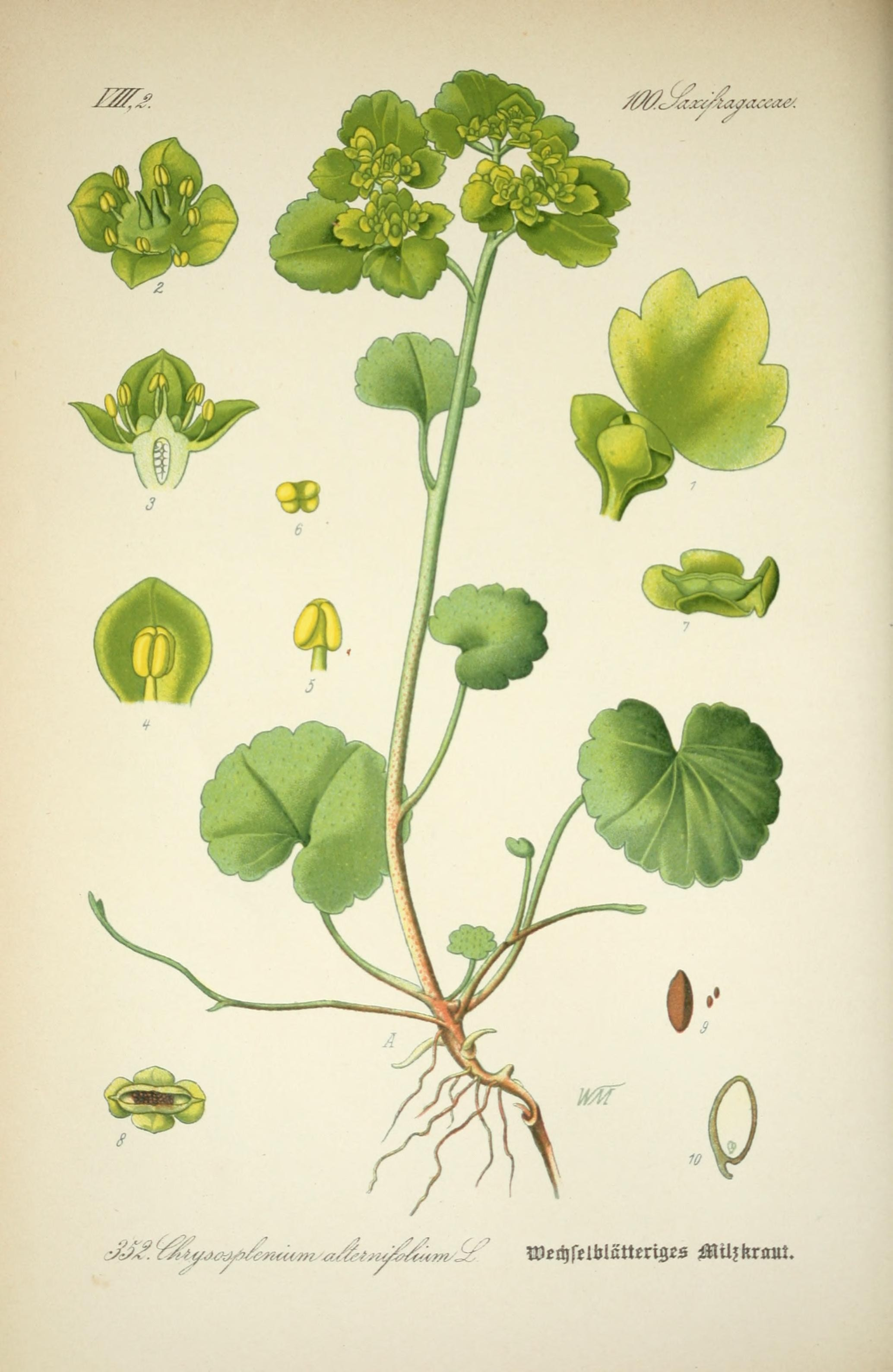 /Ws. /fl^ aaac6a&. Jj^.Y/.f/...-v •■./.■»«.„■ Wttytlblättttists #tü?krmti.